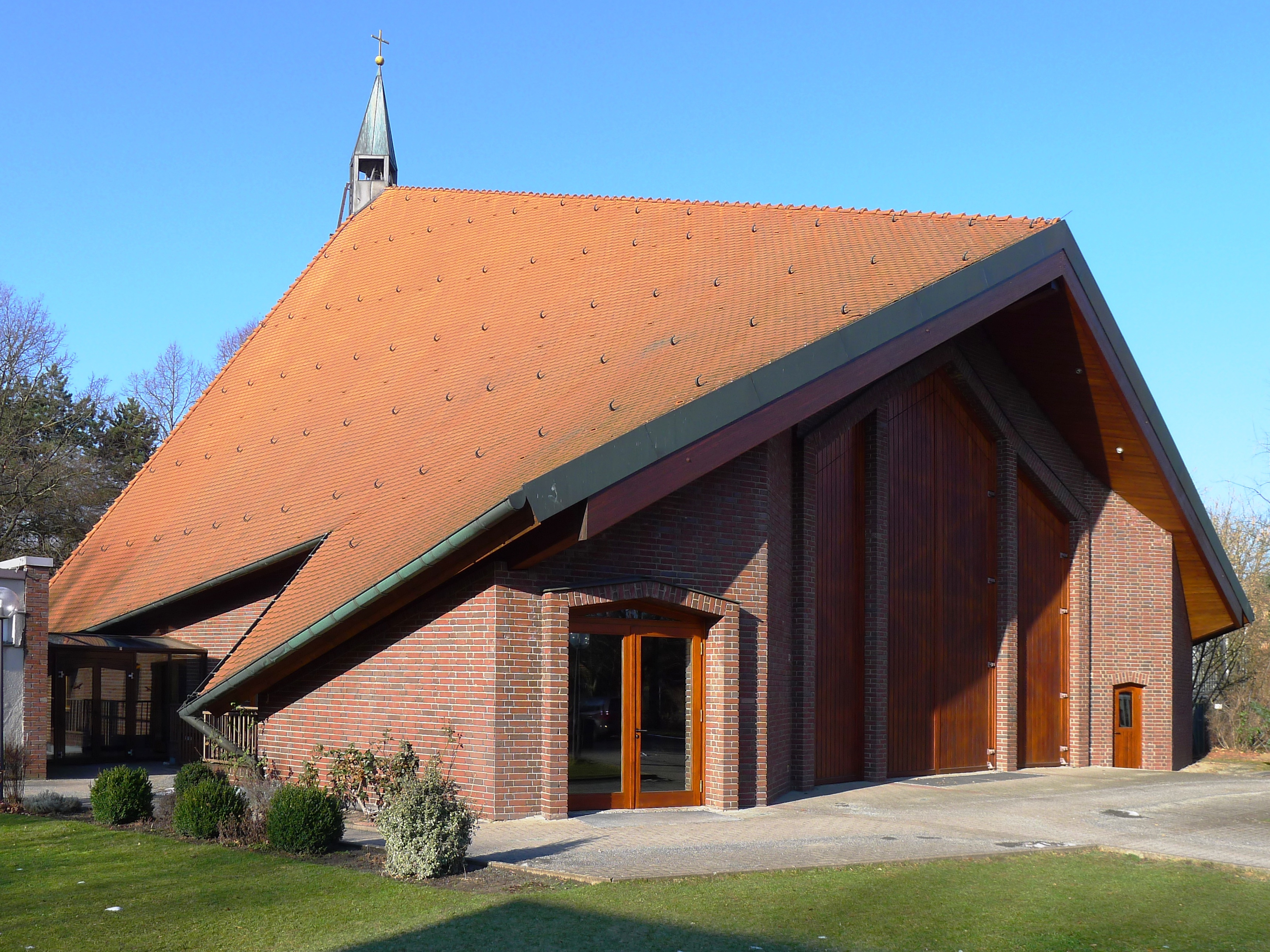 Schrägansicht der Kirche